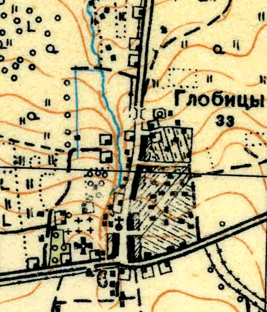 Топографическая карта Ленинградской области, квадрат О-35-11-В-г (Петровицы), деревня Глобицы.